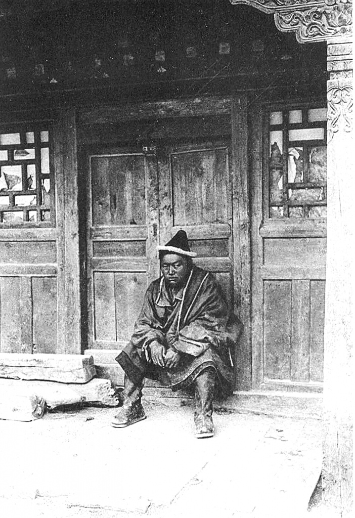 Цайдамский монгол